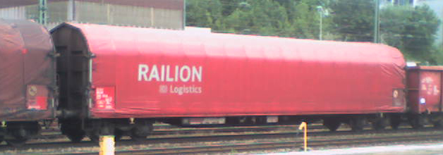 Rilns654: Vierachsiger Flachwagen der Regelbauart mit Planenhaube und ohne Rungen der DB; aufgenommen im Bahnhof Aalen